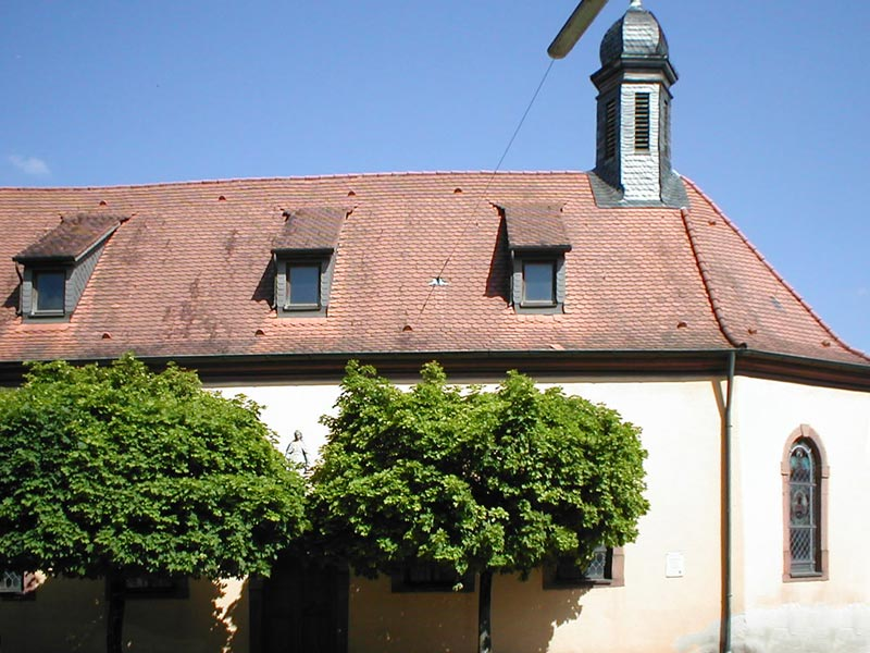 Alte katholische Kirche in Epfenbach, erbaut 1742, Kirche bis 1962, dann Marienkapelle, seit 1992 Künstleratelier.